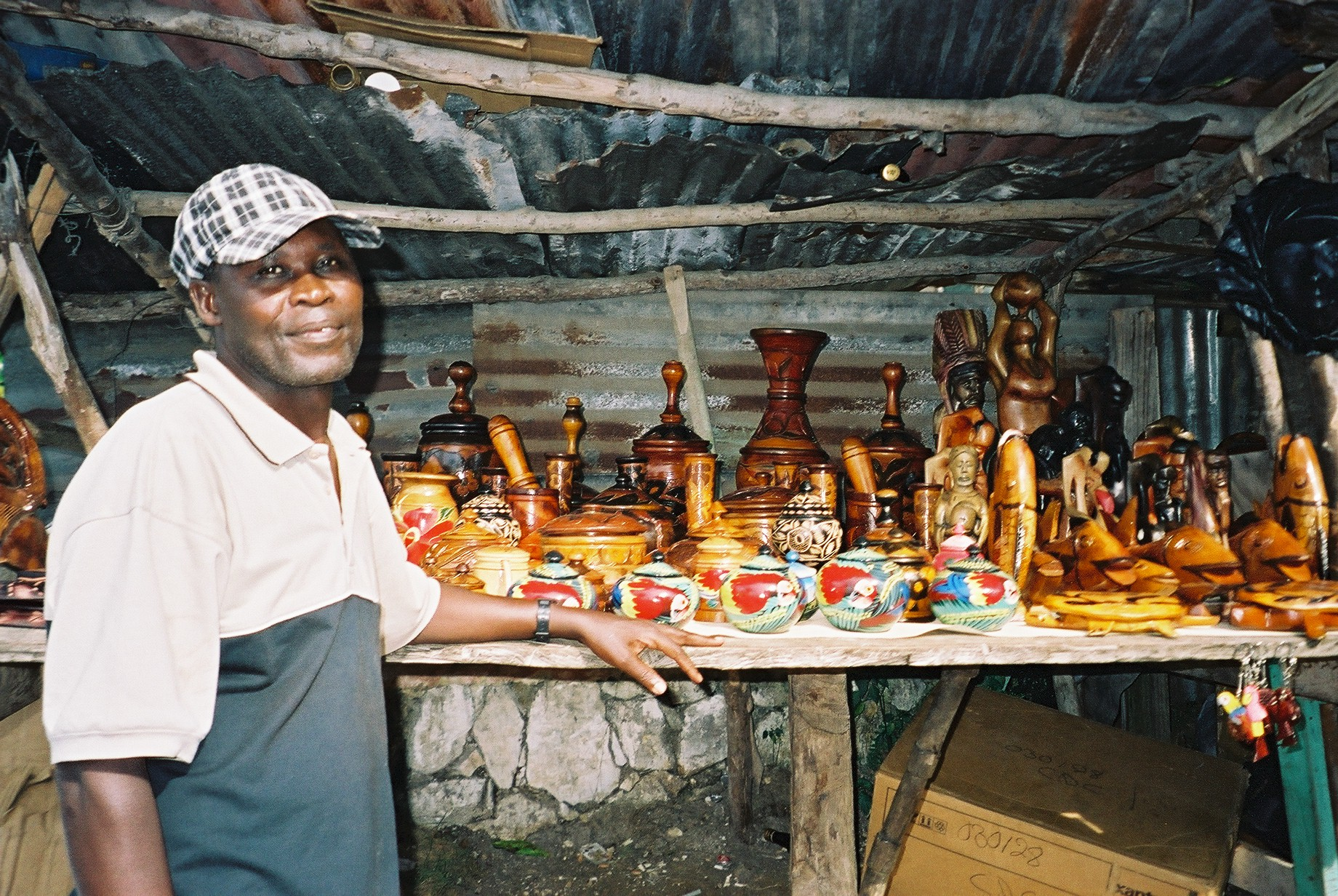 Artisan à Kenscoff